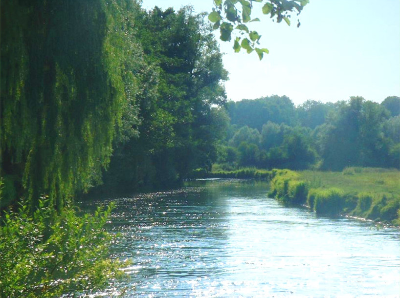 L'Authie près de Maintenay (Pas-de-Calais)